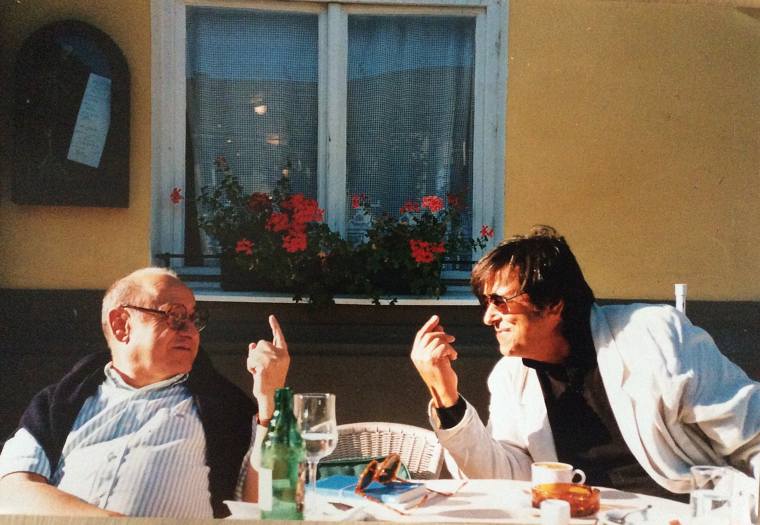 Die beiden Architekten Gustav Peichl und Richard Gach in Gars am Kamp, 1990